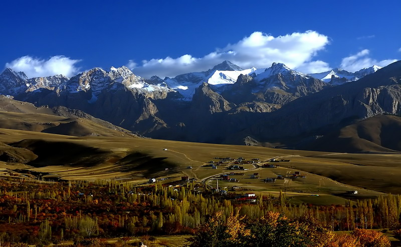 çamardı UFUK MERAL